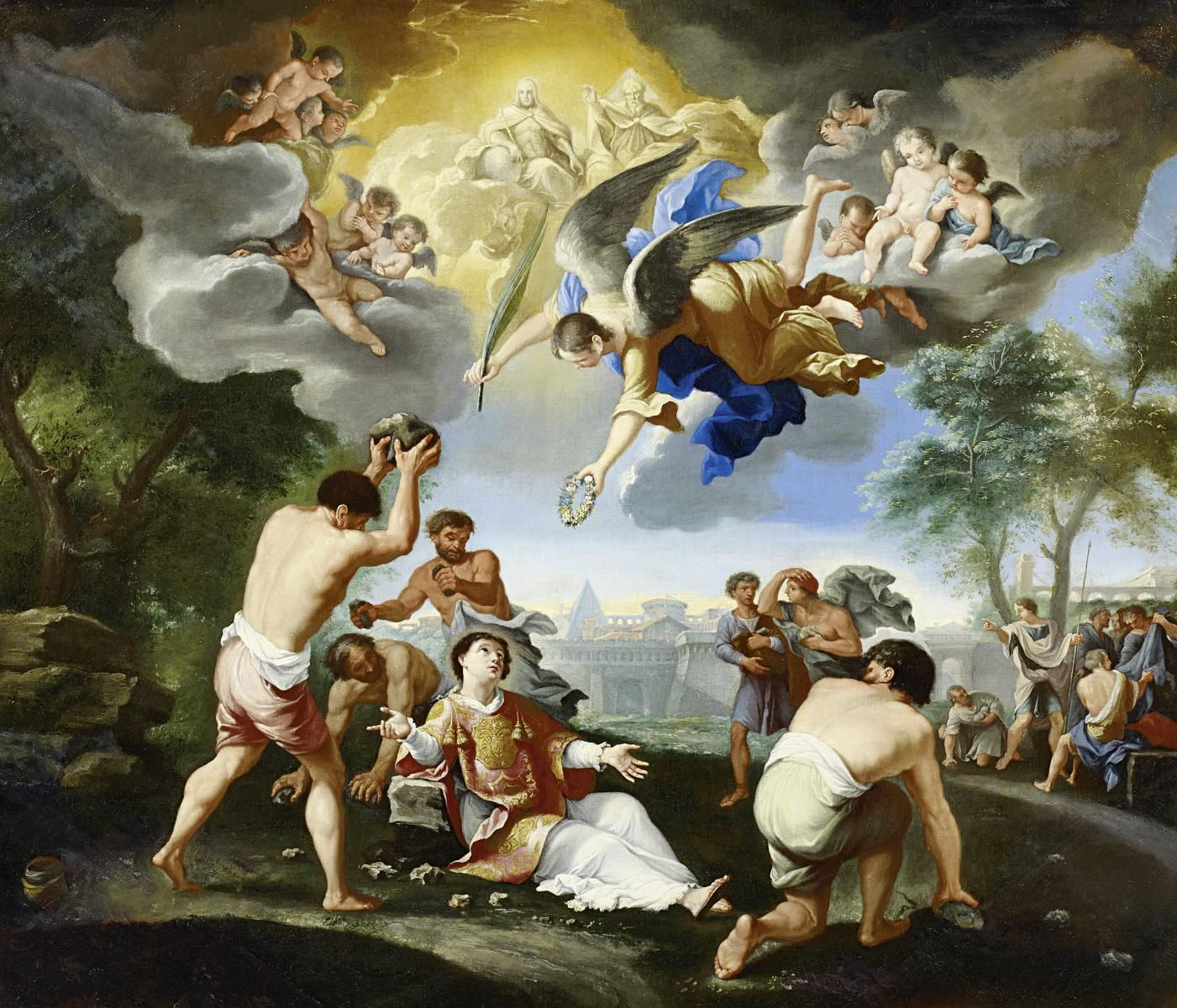 Die Steinigung des Heiligen Stephanus. Öl auf Leinwand. 84 x 99 cm.